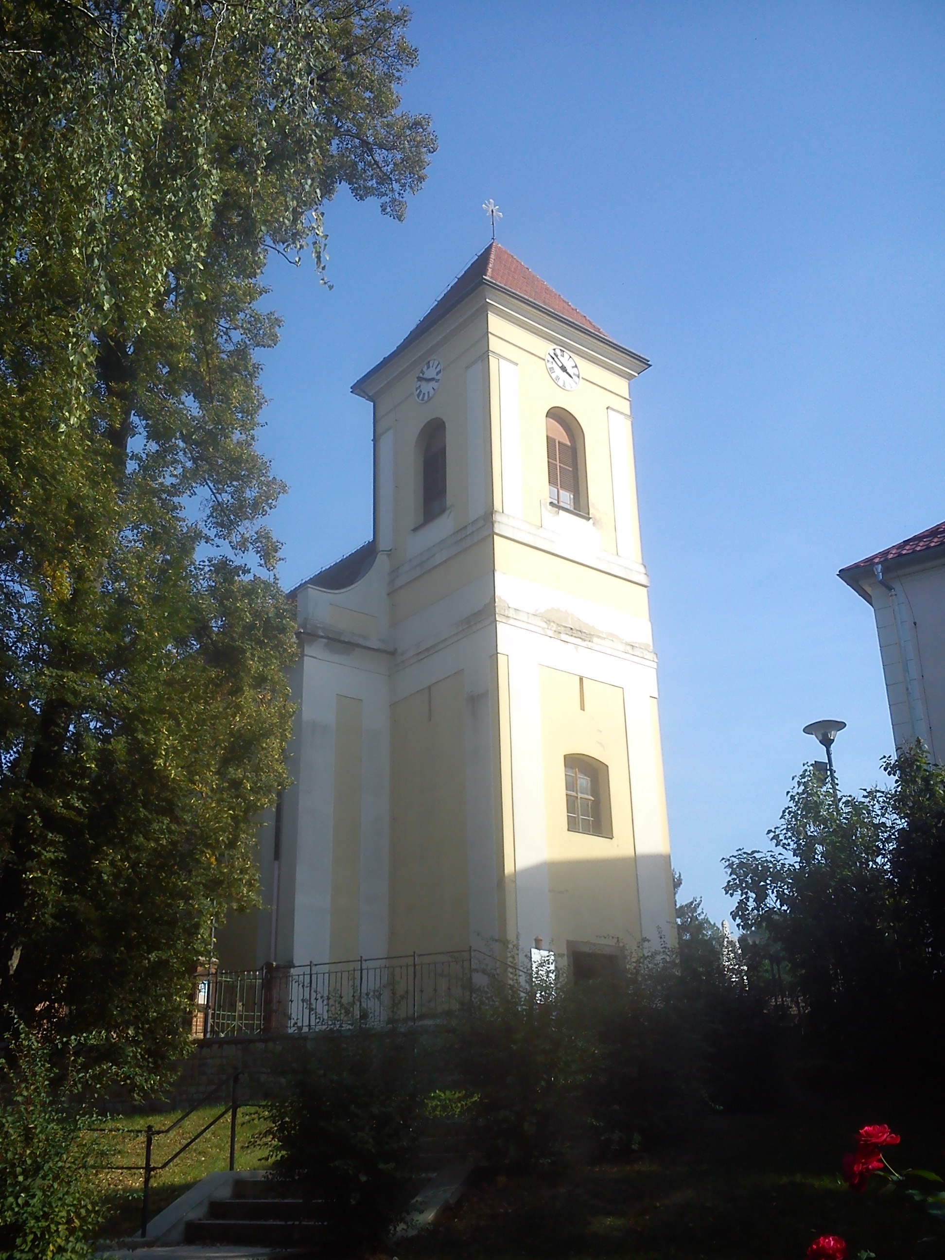 Kostel sv. Jana Křtitele v Boleradicích